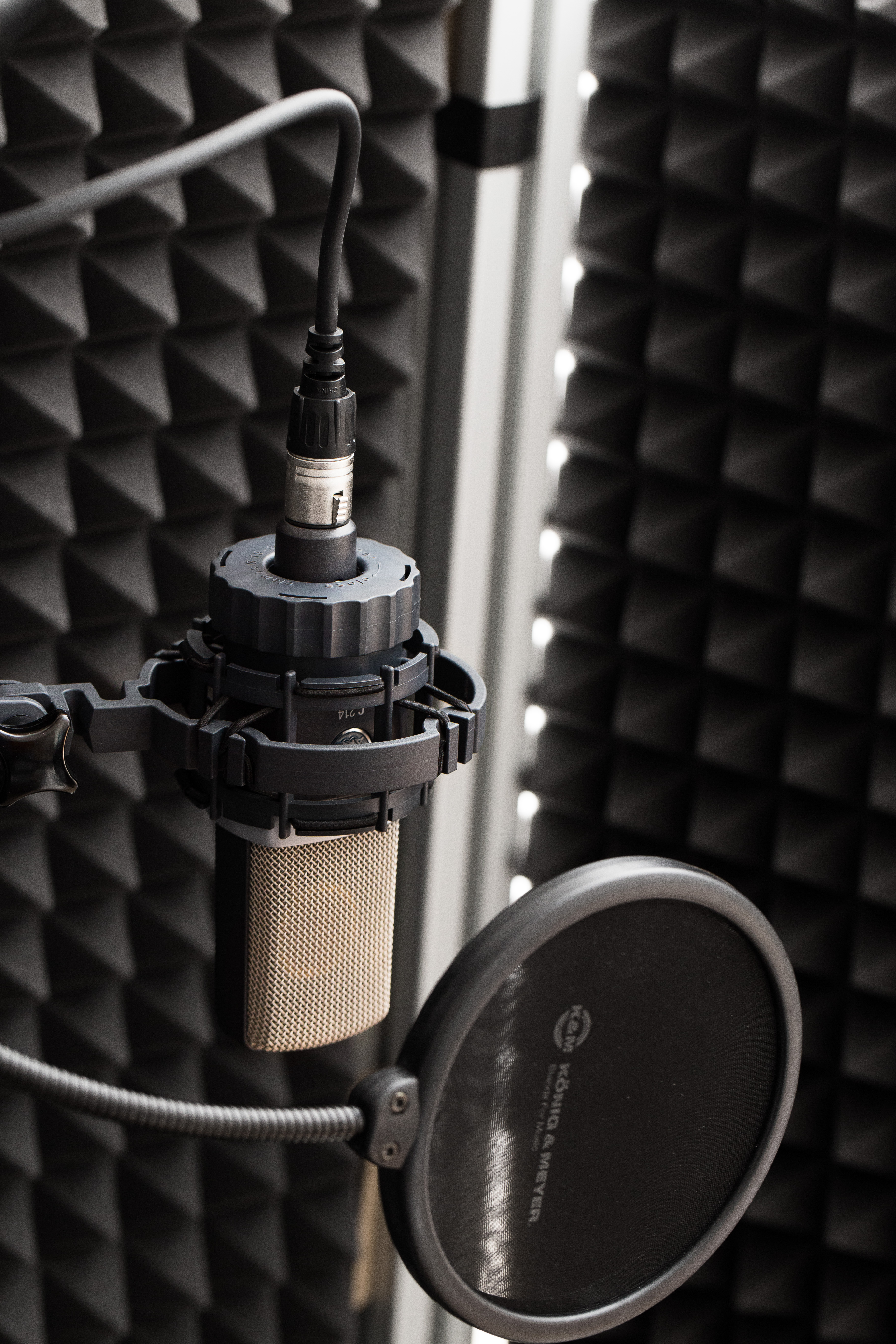 AKG C14 Kondensator-Mikrofon mit Mikrofonspinne und Popfilter